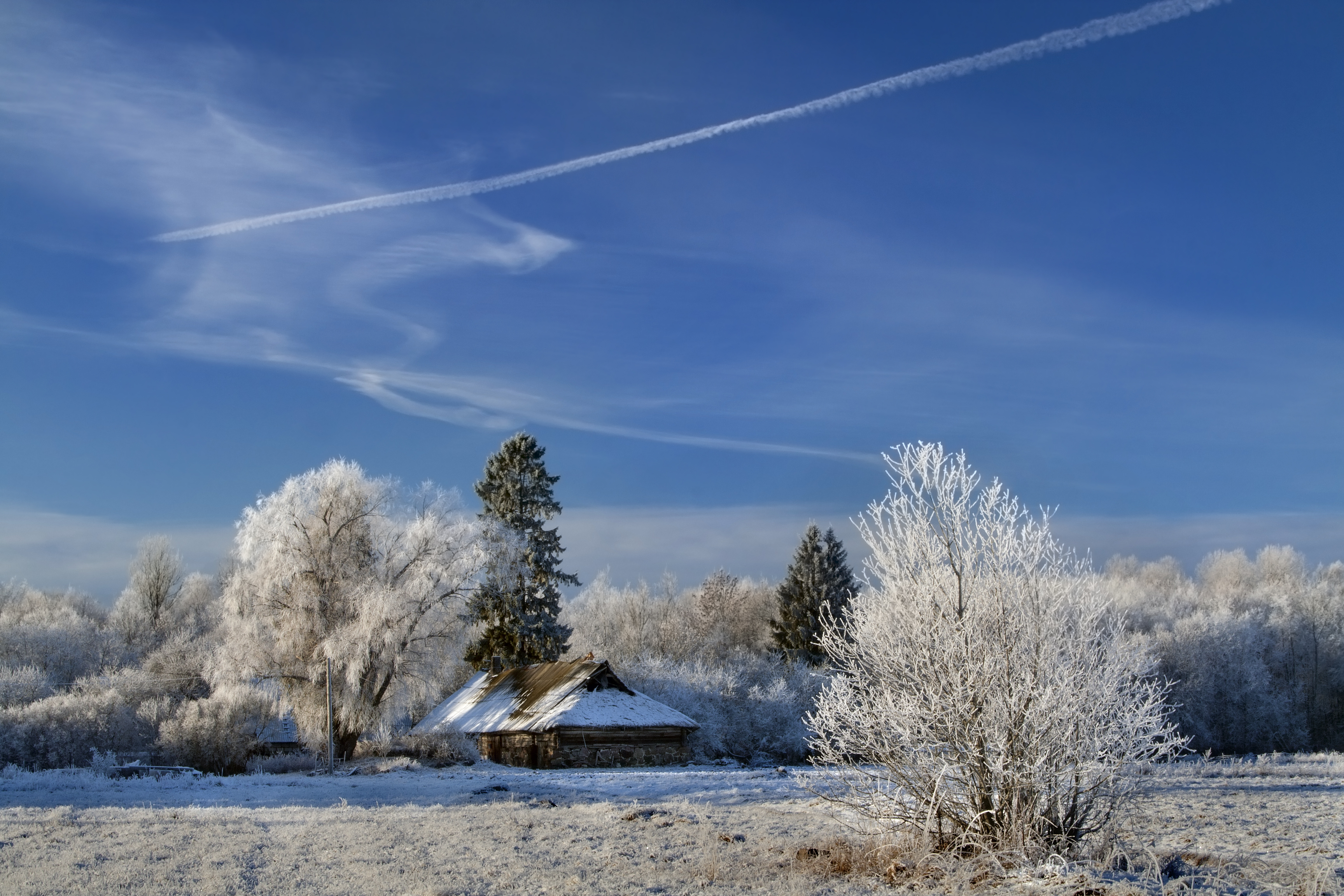 Härmatises talumaja Haeskas